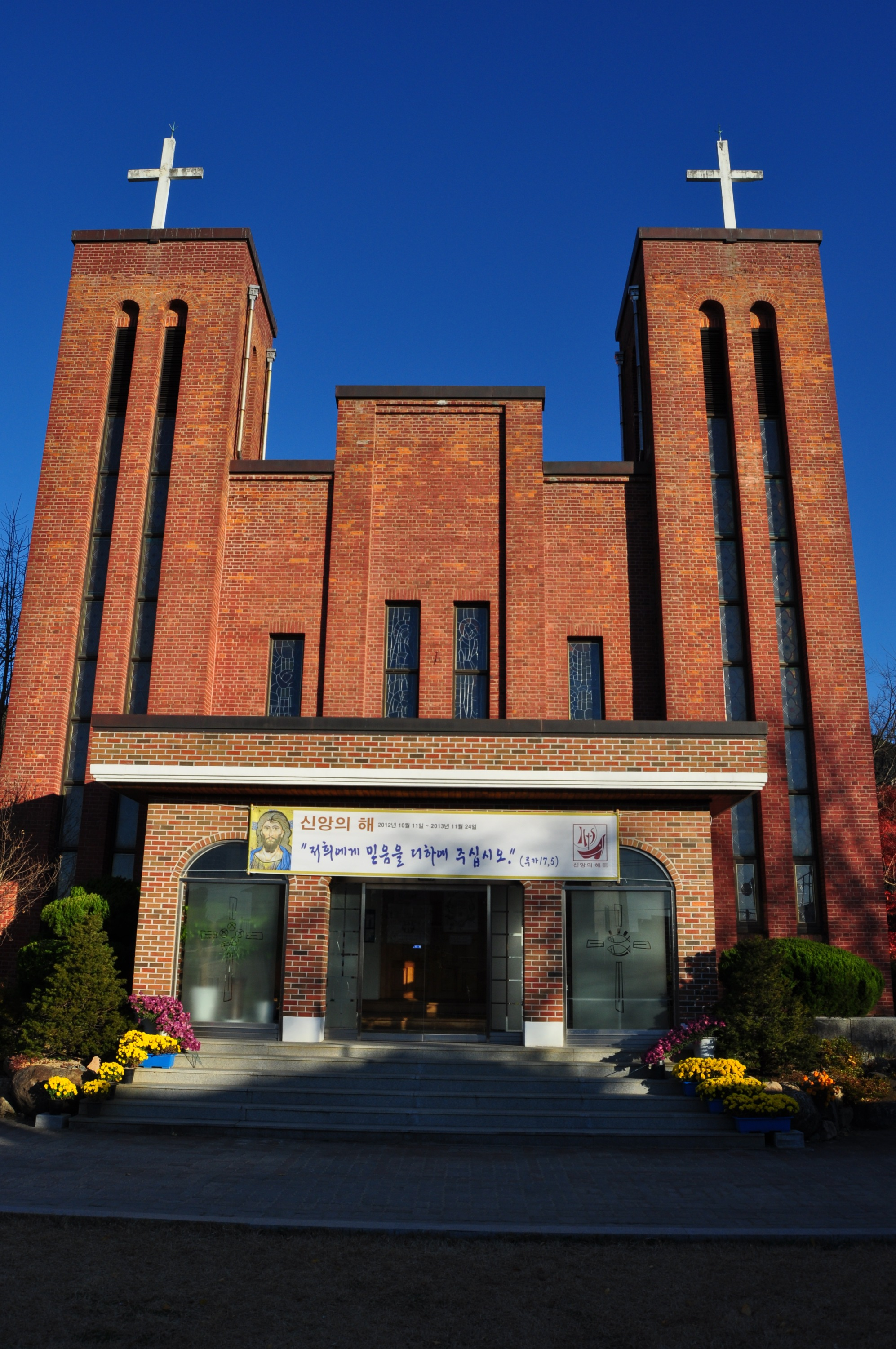 창녕성당 (천주교 마산교구, 경남 창녕군 창녕읍 소재)